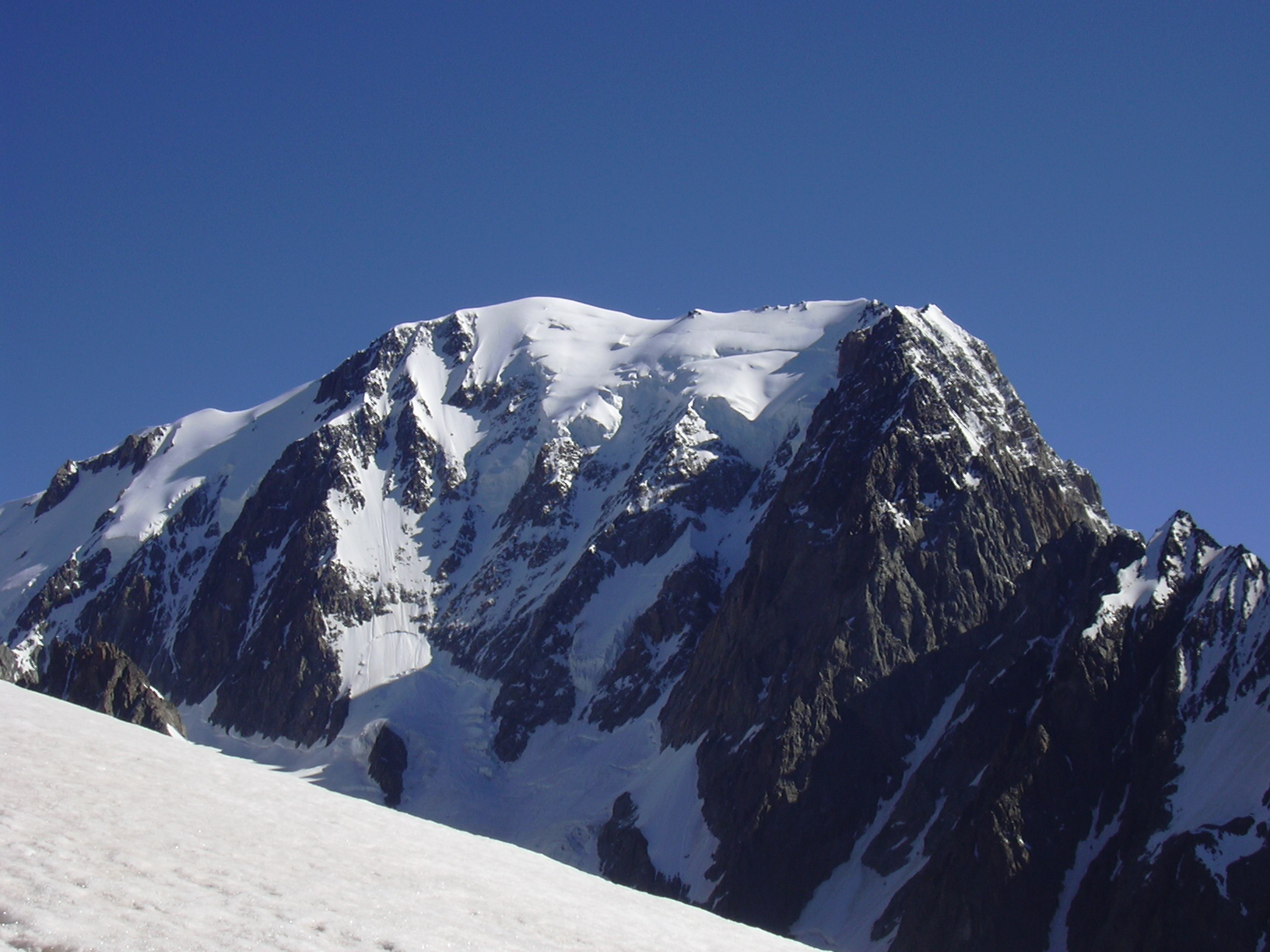 Mont-Blanc depuis les pentes du Petit Mont-Blanc